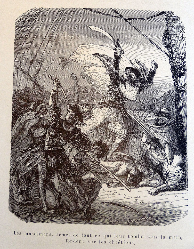 "les musulmans, armés de tout ce tout ce qui leur tombe sous la main, fondent sur les chrétiens"